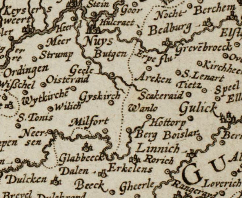 Tabula Geographica amplissimae ditionis Westphaliae conterminarumque provinciarum